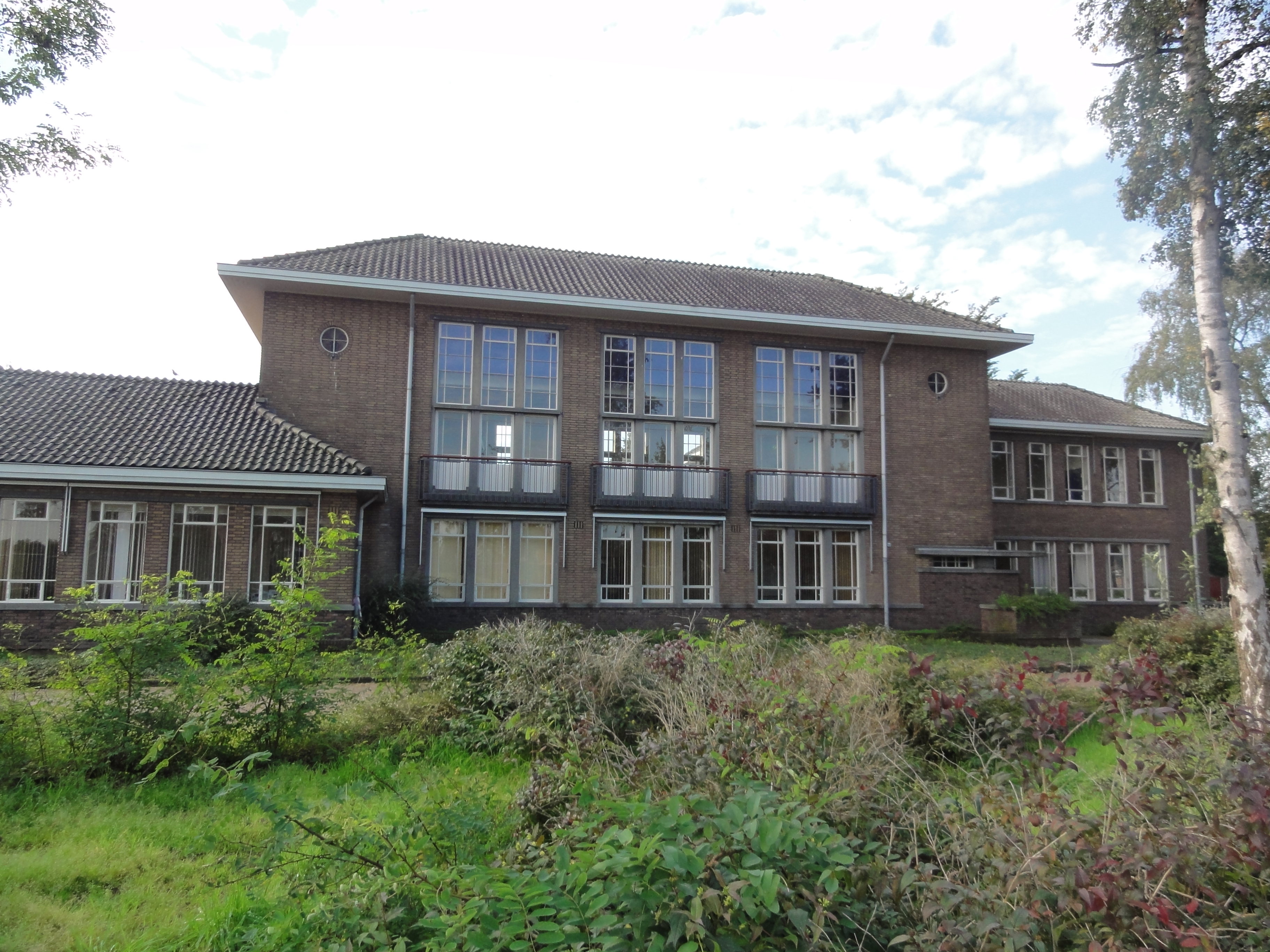 Velp Rijksmonument 515533 Generaal De Bonskazerne gebouw B regimentsbureel 78″ E Object location51° 44′ 48.42″ N, 5° 43′ 54.13″ E